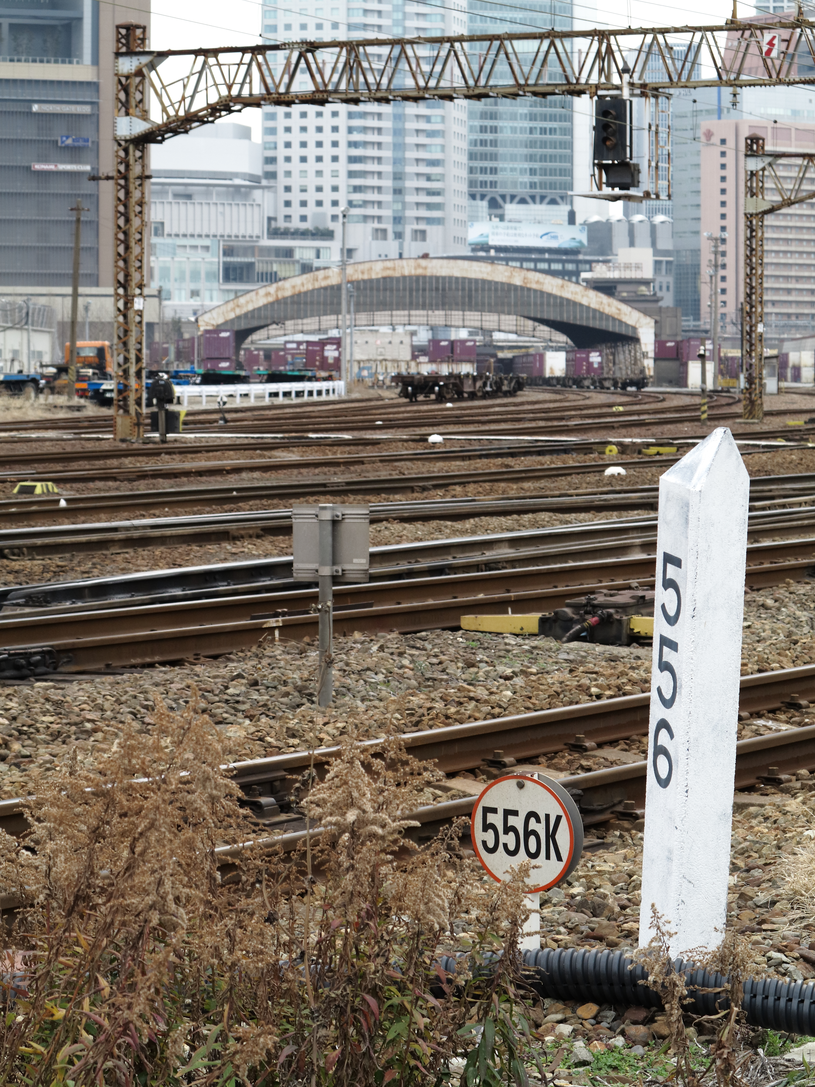 梅田貨物駅-13-05